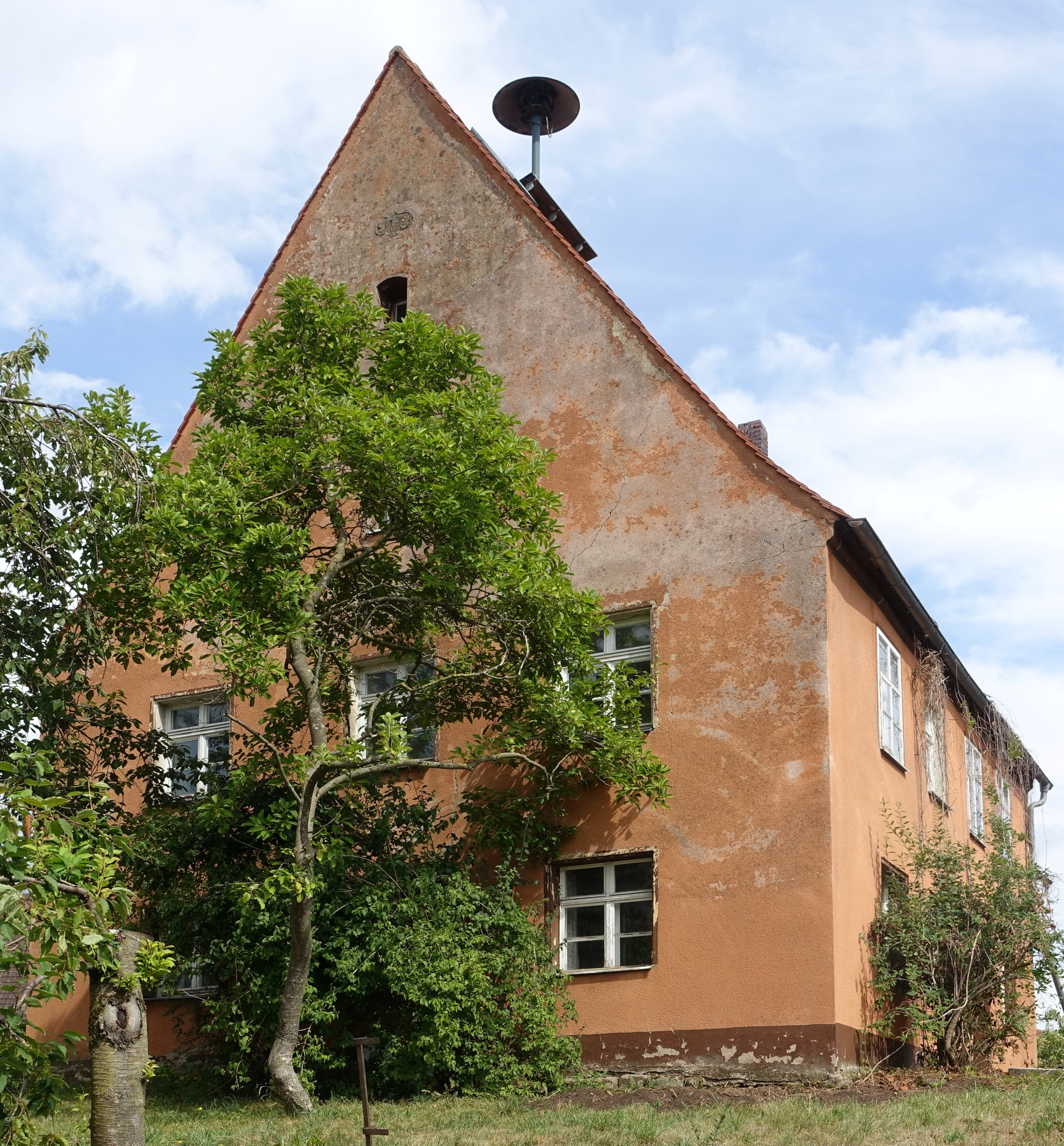 zweigeschossigem Wohnhaus mit Satteldach